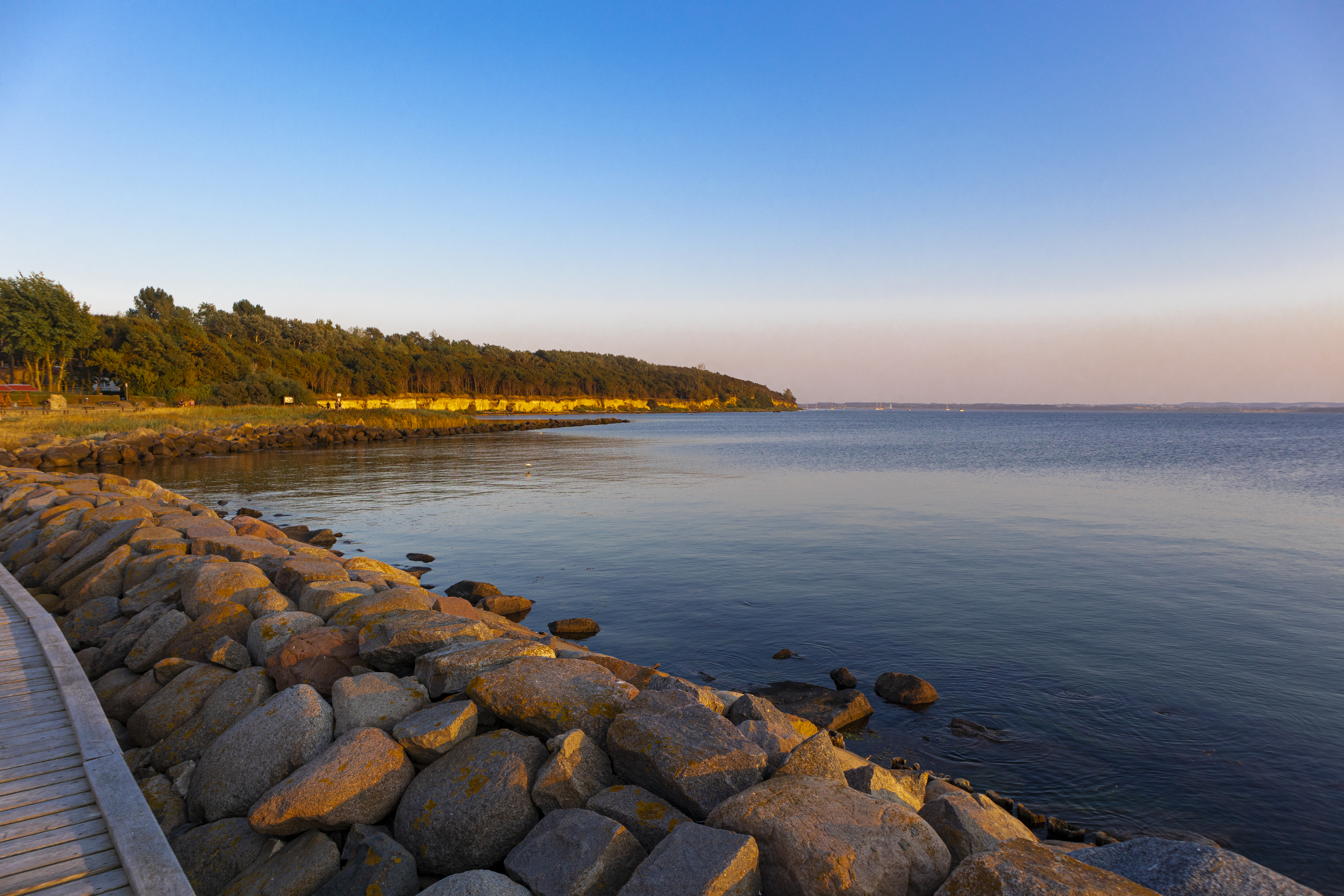 Insel Poel, Timmendorf